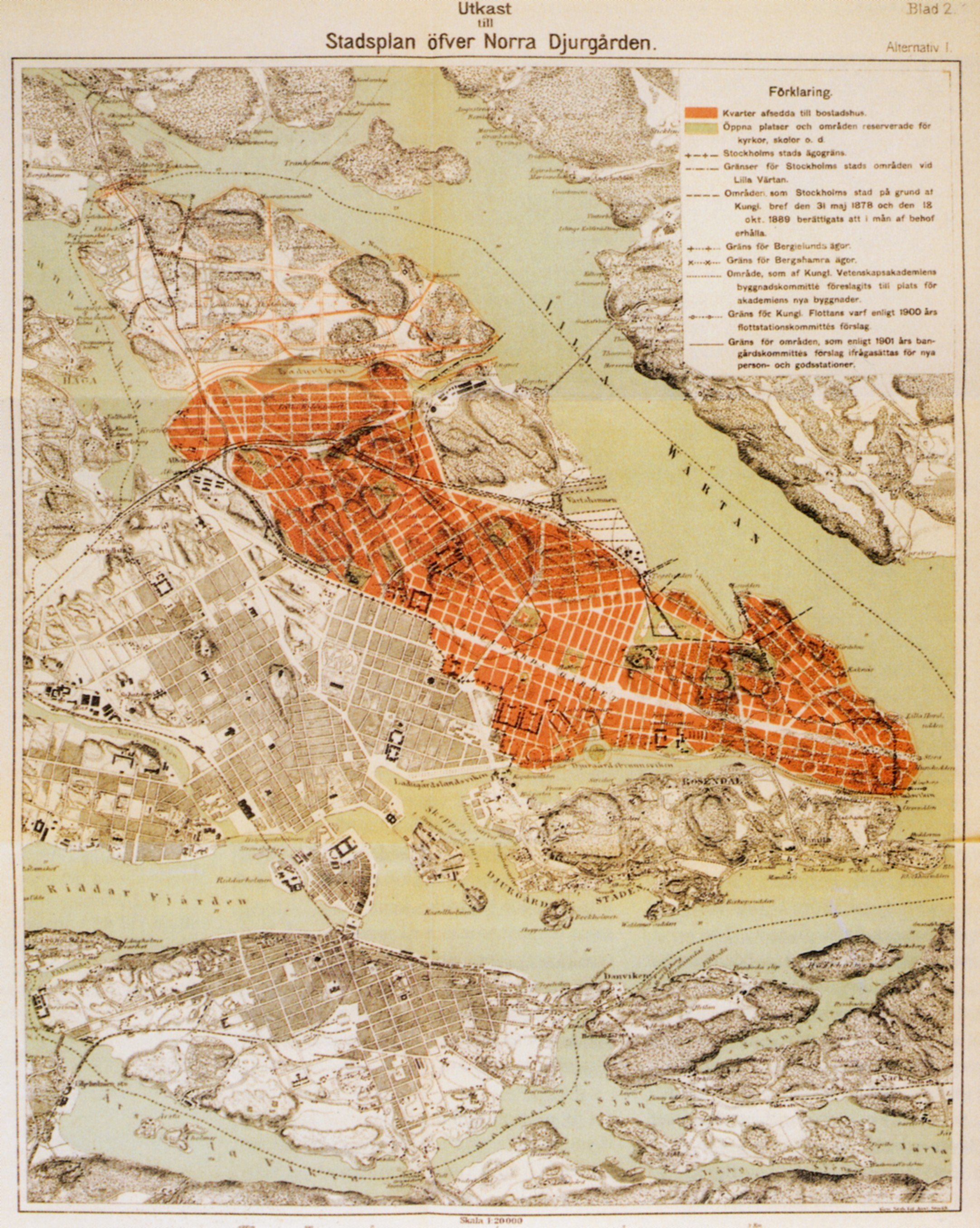 Utkast till stadsplan öfver Norra Djurgården